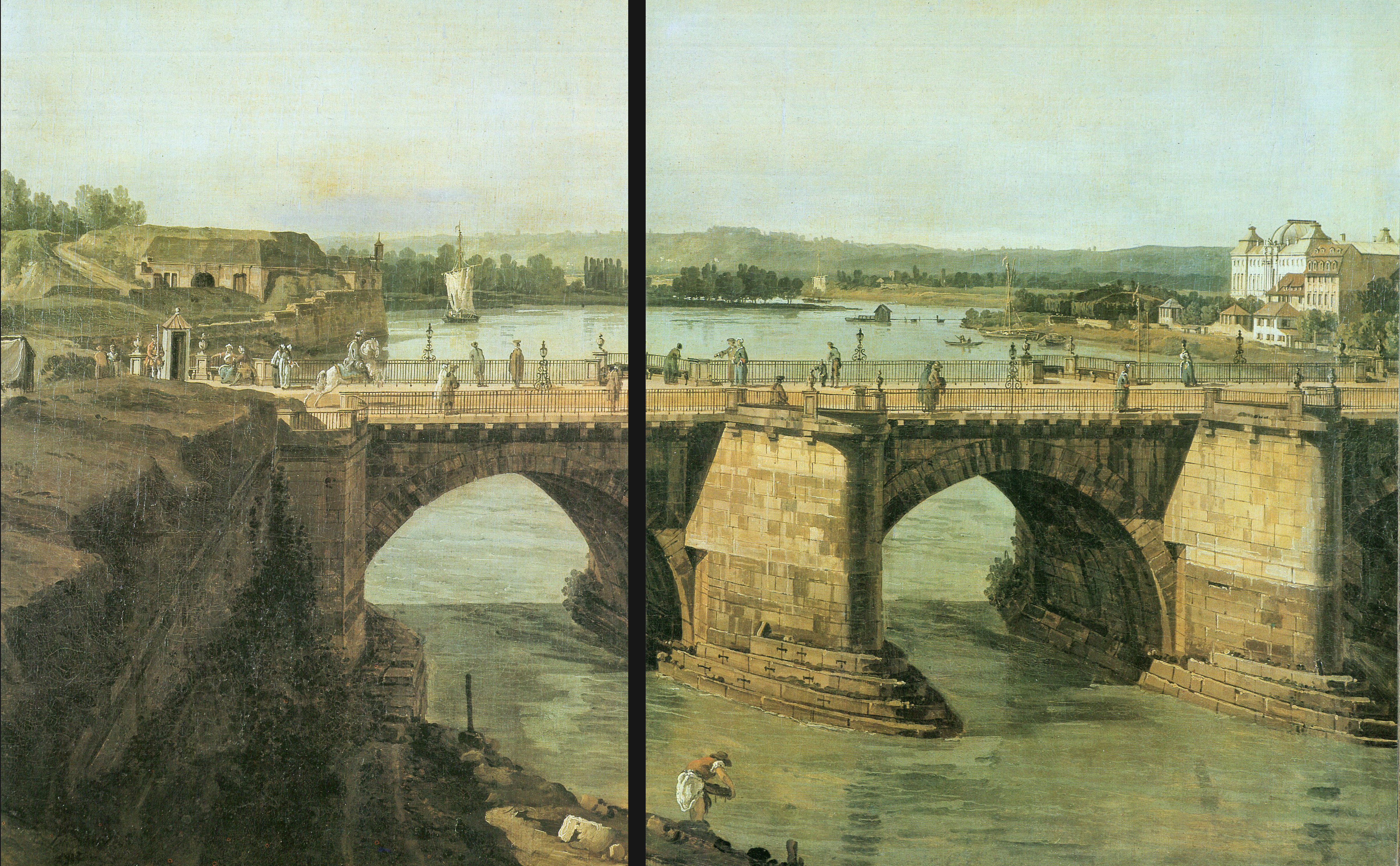 Aufgang zur Augustusbrücke, im Hintergrund die Elblandschaft mit der Lößnitz (2)label QS:Lde,"Aufgang zur Augustusbrücke, im Hintergrund die Elblandschaft mit der Lößnitz (2)"